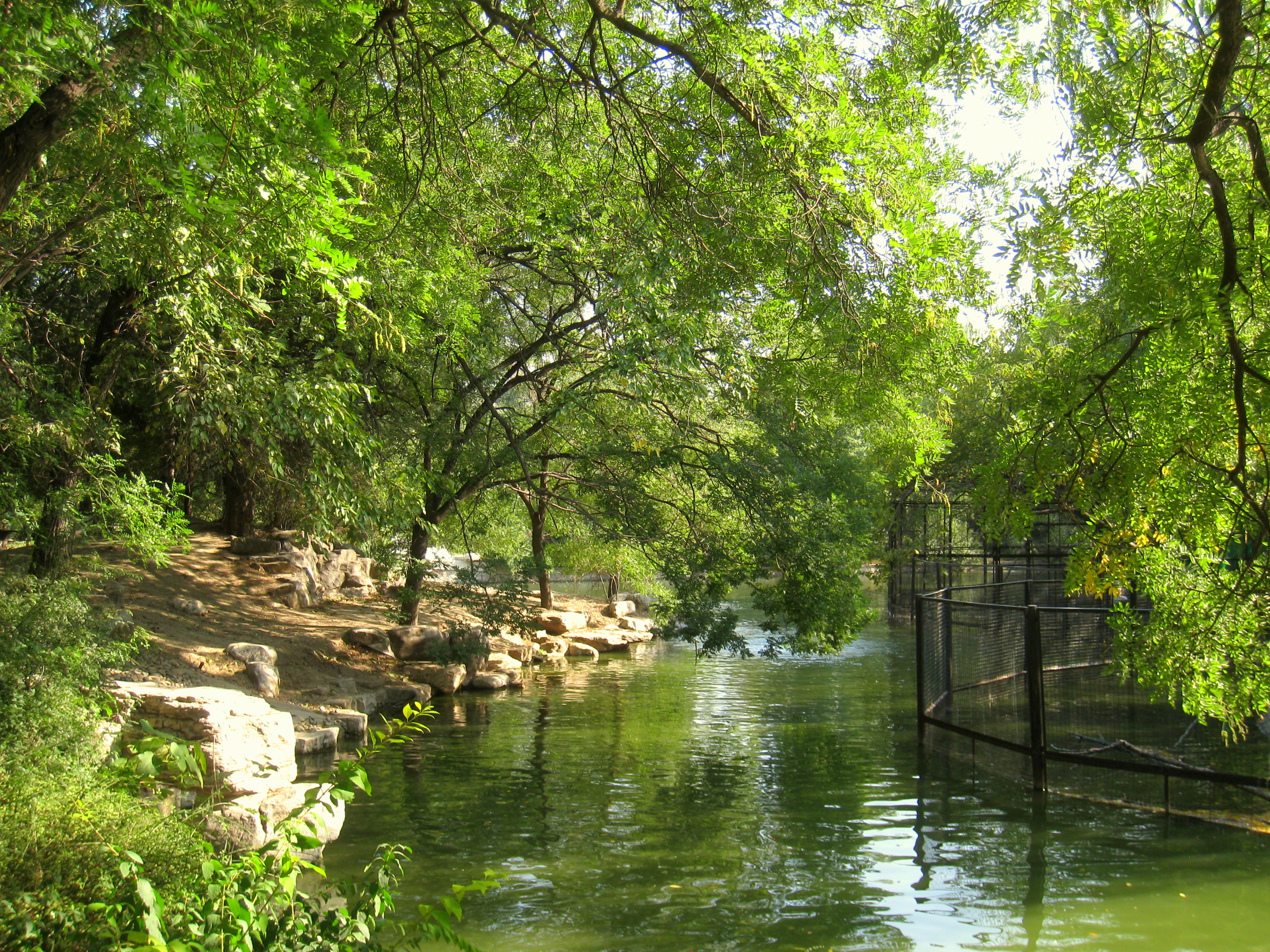 Beijing Zoo (北京动物园), Beijing, China.